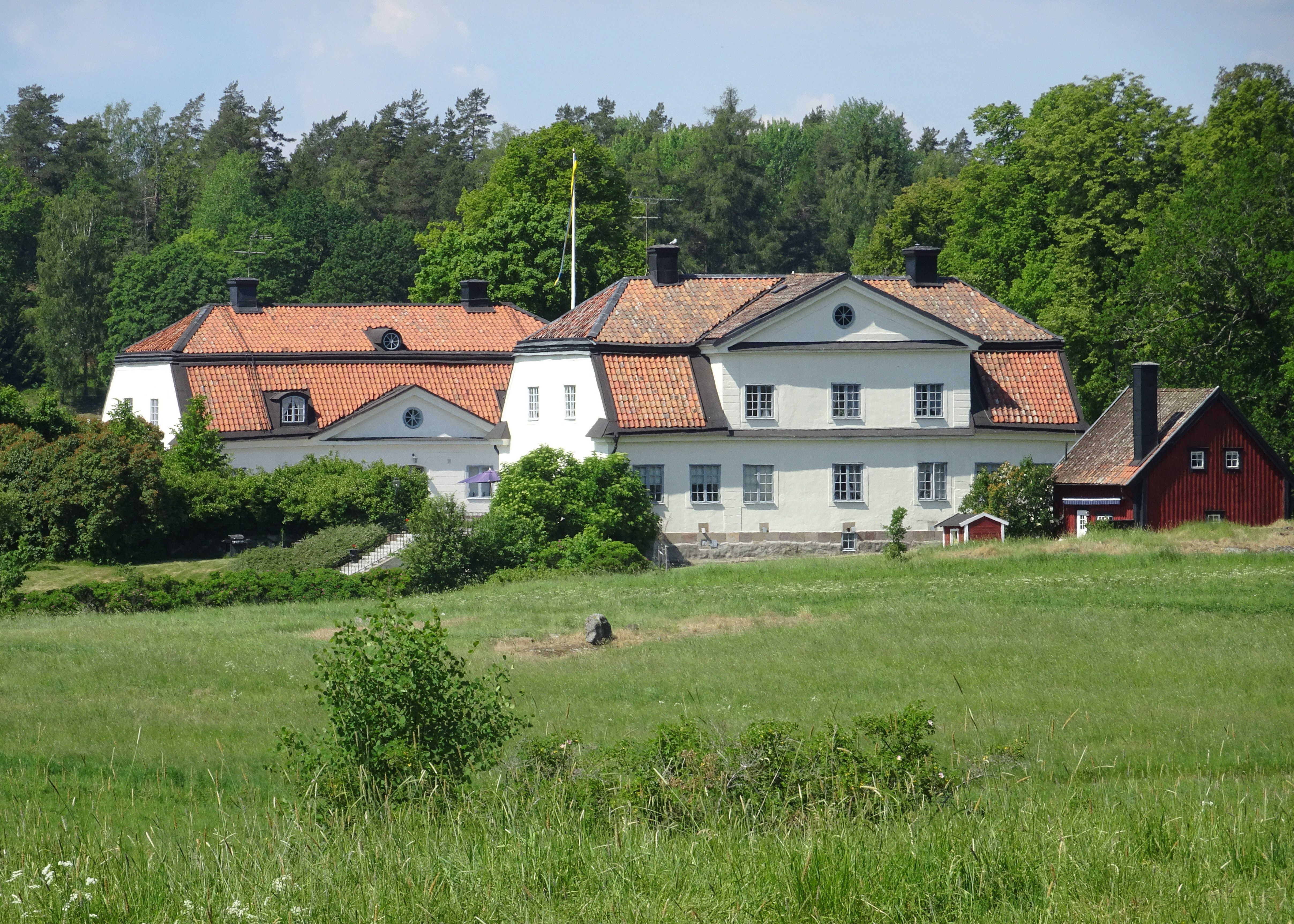 Sörby gård i Torsåkers socken, Gnesta kommun